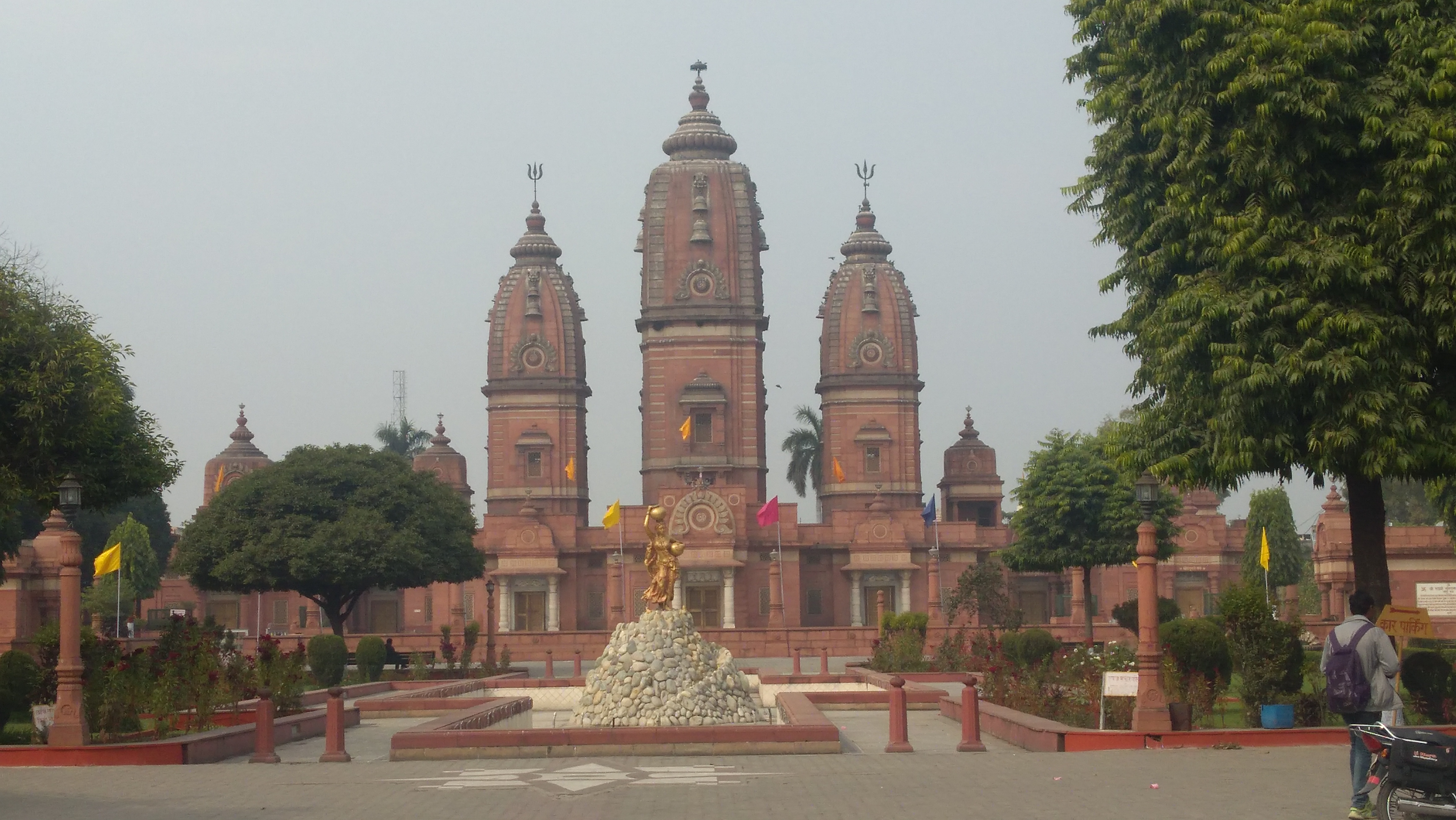 Laxmi Narayan temple, Modinagar, Ghaziabad